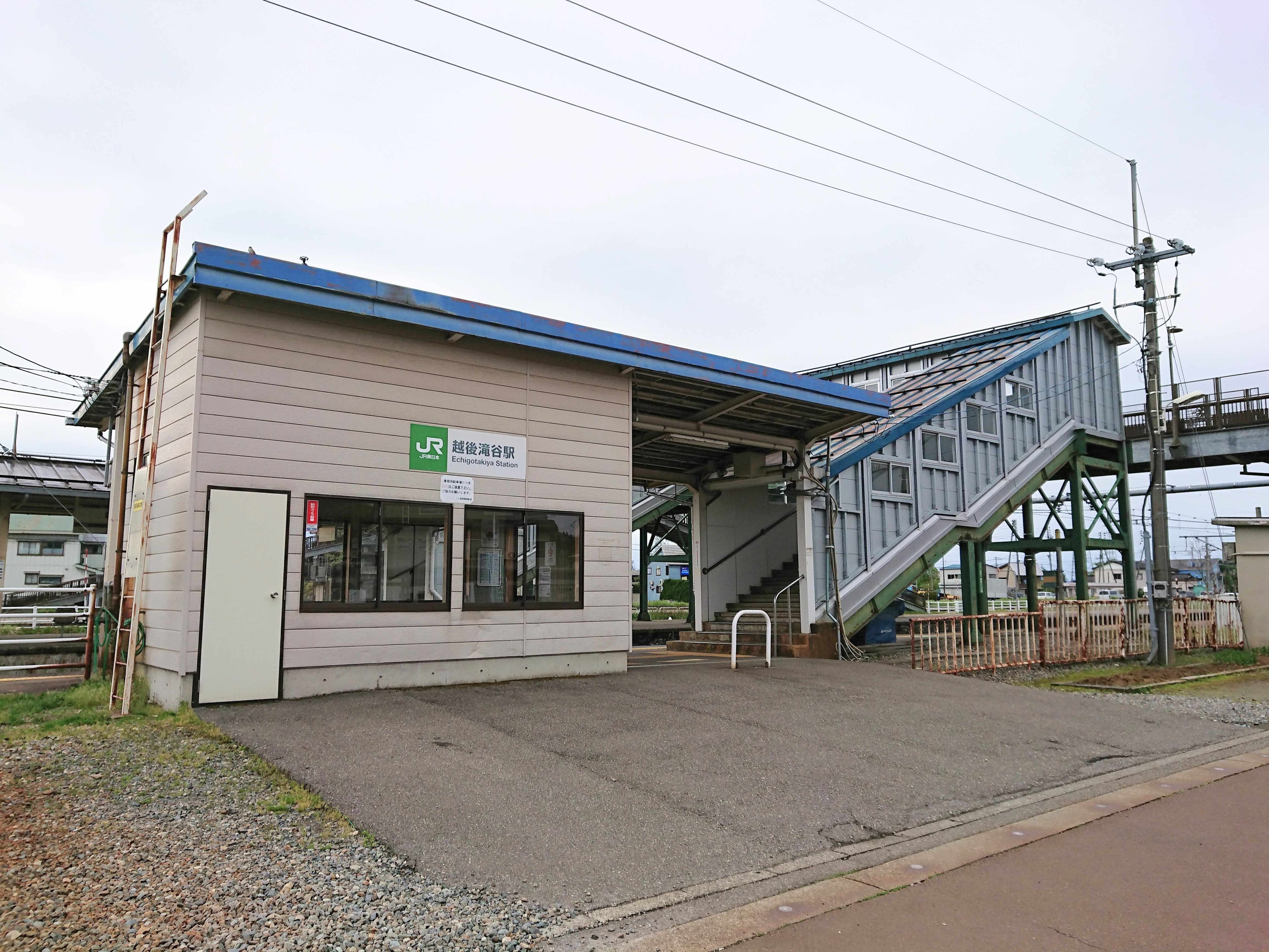 越後滝谷駅の新駅舎